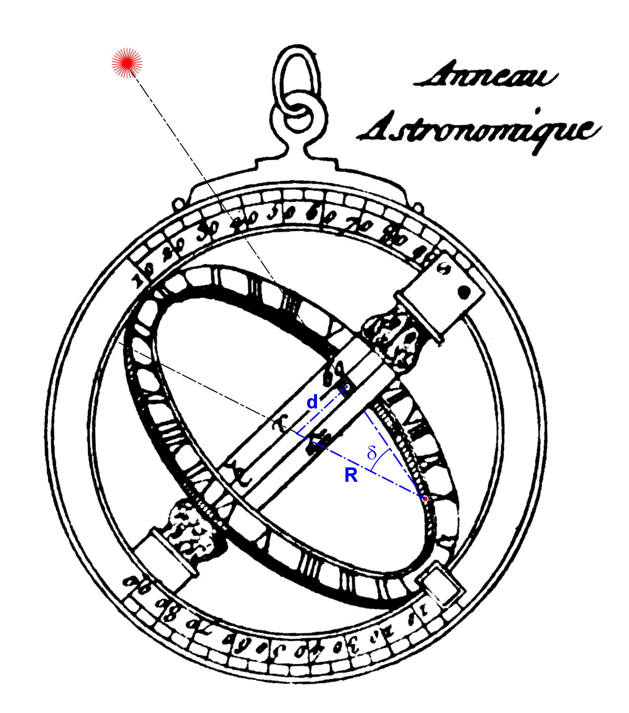 Principe de graduation calendaire en fonction de la déclinaison solaire.